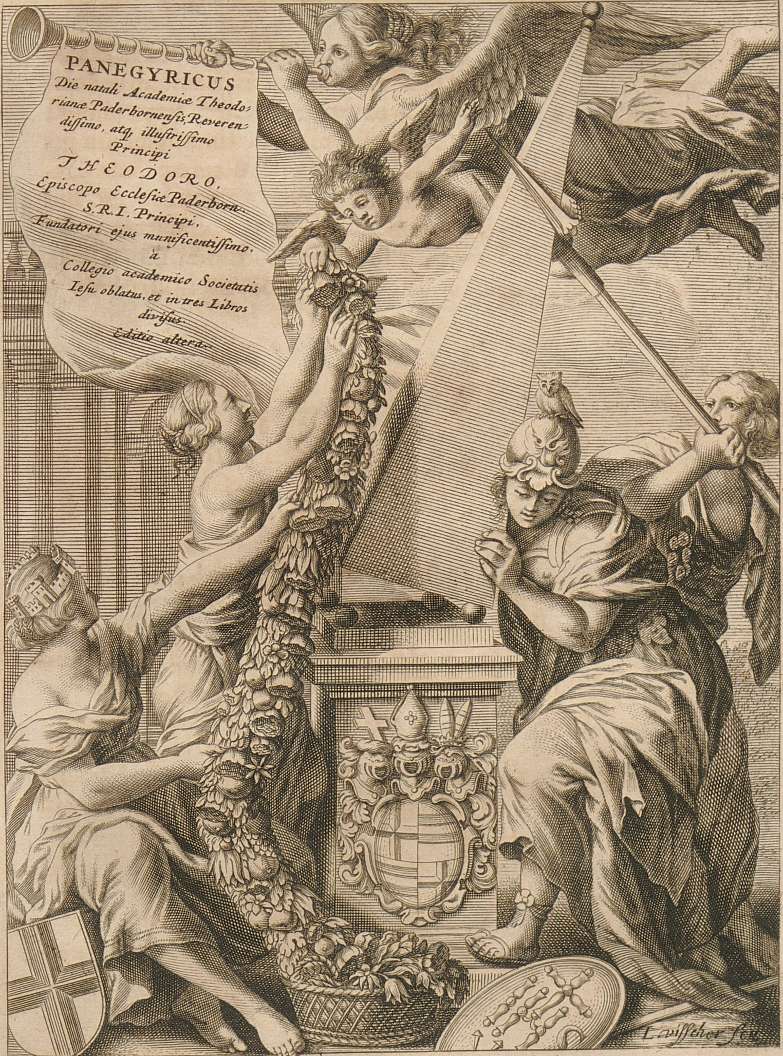 Titelblatt der Zugabe Panegyricus... in der Monumenta Paderbornensia 2. Ausgabe von 1672